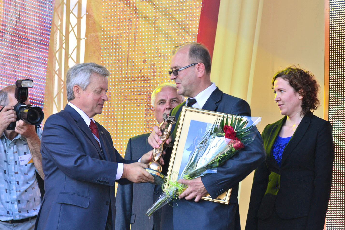 «Золотой купидон» за лучшую книгу 2011 года Славомиру Антоновичу вручает Анатолий Тозик, вице-премьер республики, на празднике белорусской письменности. г. Глубокое, 2 сентября 2012 года.